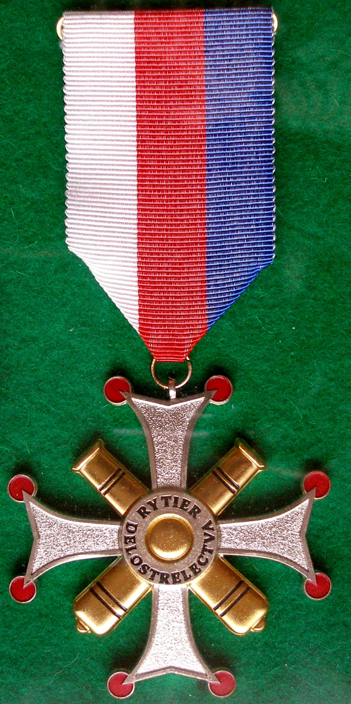 Kríž "Rytier delostrelectva" udelený v Martine na Slovensku, organizáciou Česká a slovenská obec delostrelecká (ČASOD) z roku 2005.